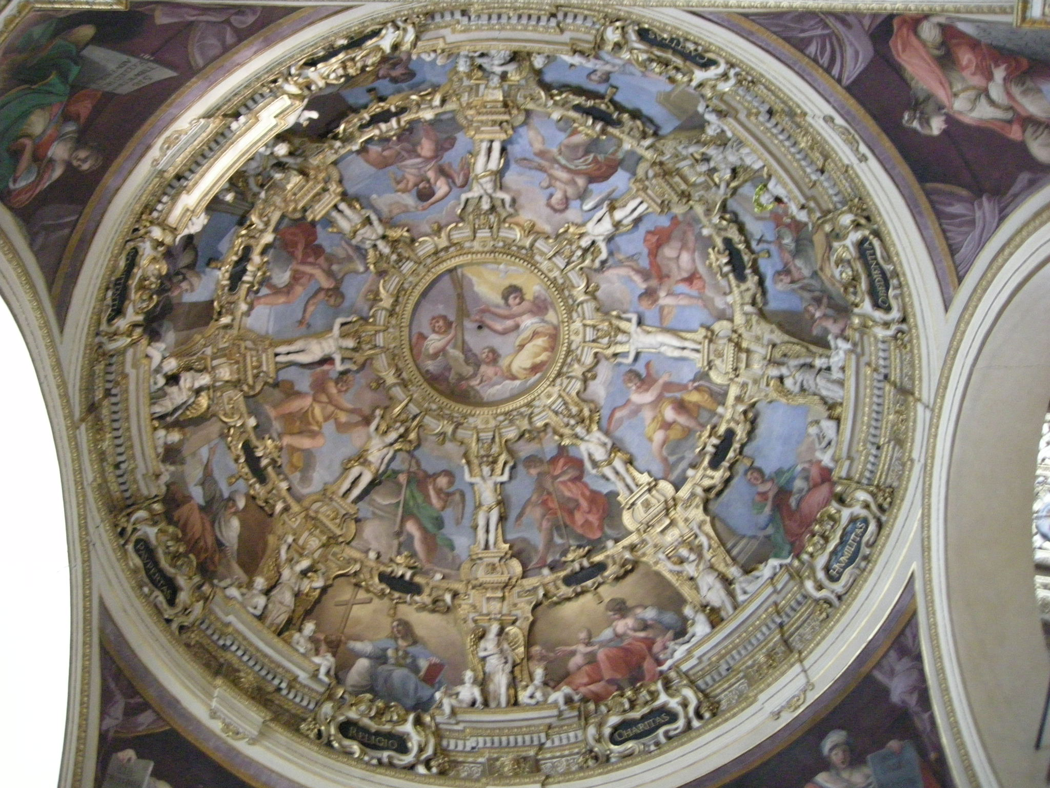 Madonna della Ghiara, interno, soffitto